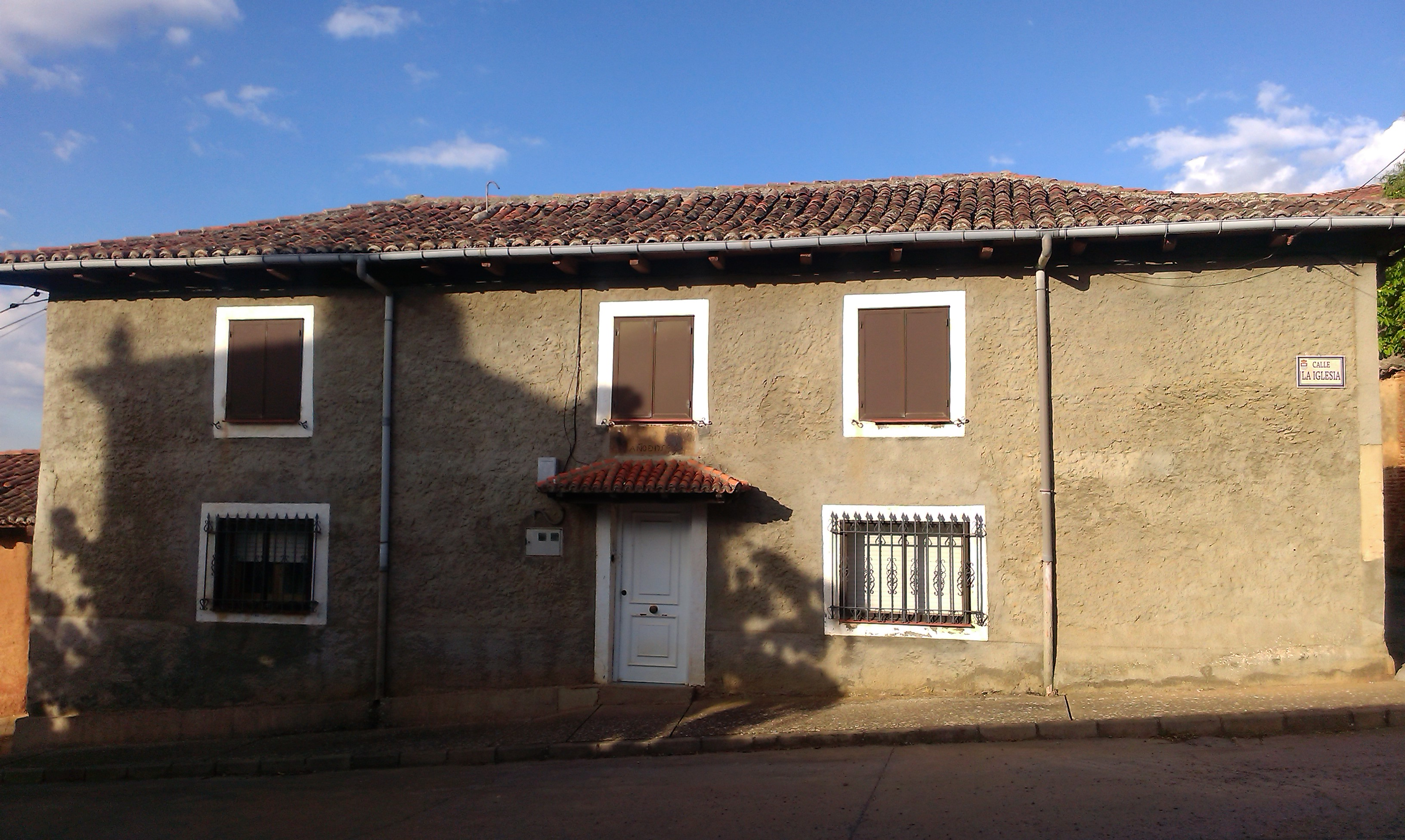 Carcel Canalejas